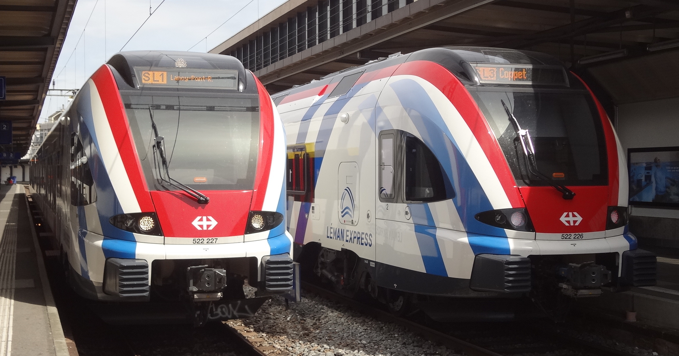 Deux rames du Léman Express à la gare Cornavin, à Genève. Lignes «S L1» et «S L3».